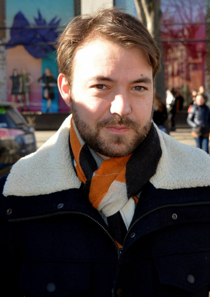 Hubert Charuel au déjeuner des nommés des César du cinéma